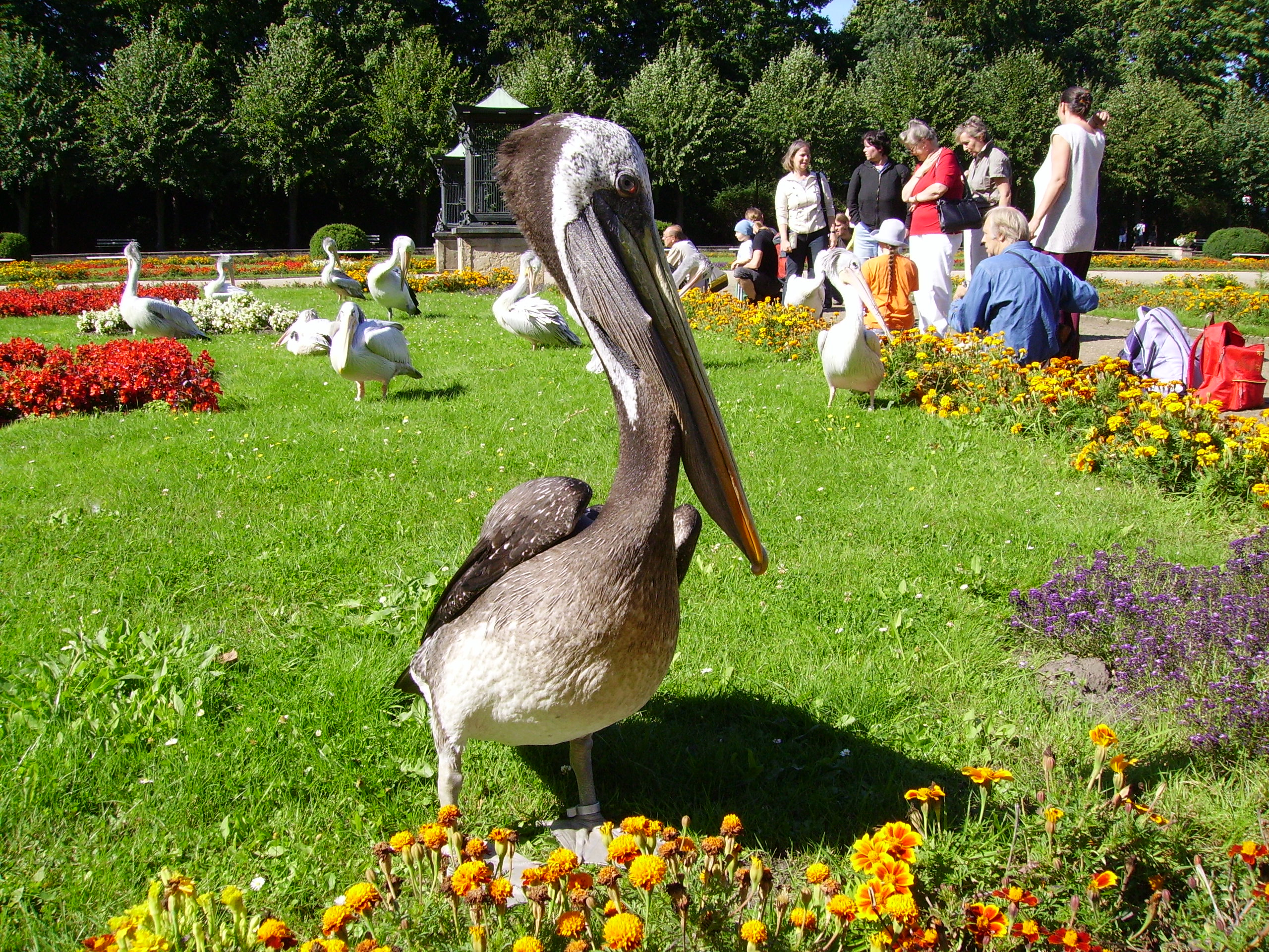 Pelikan im Tierpark